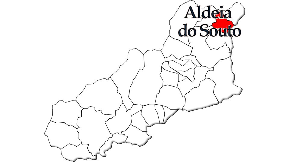 População